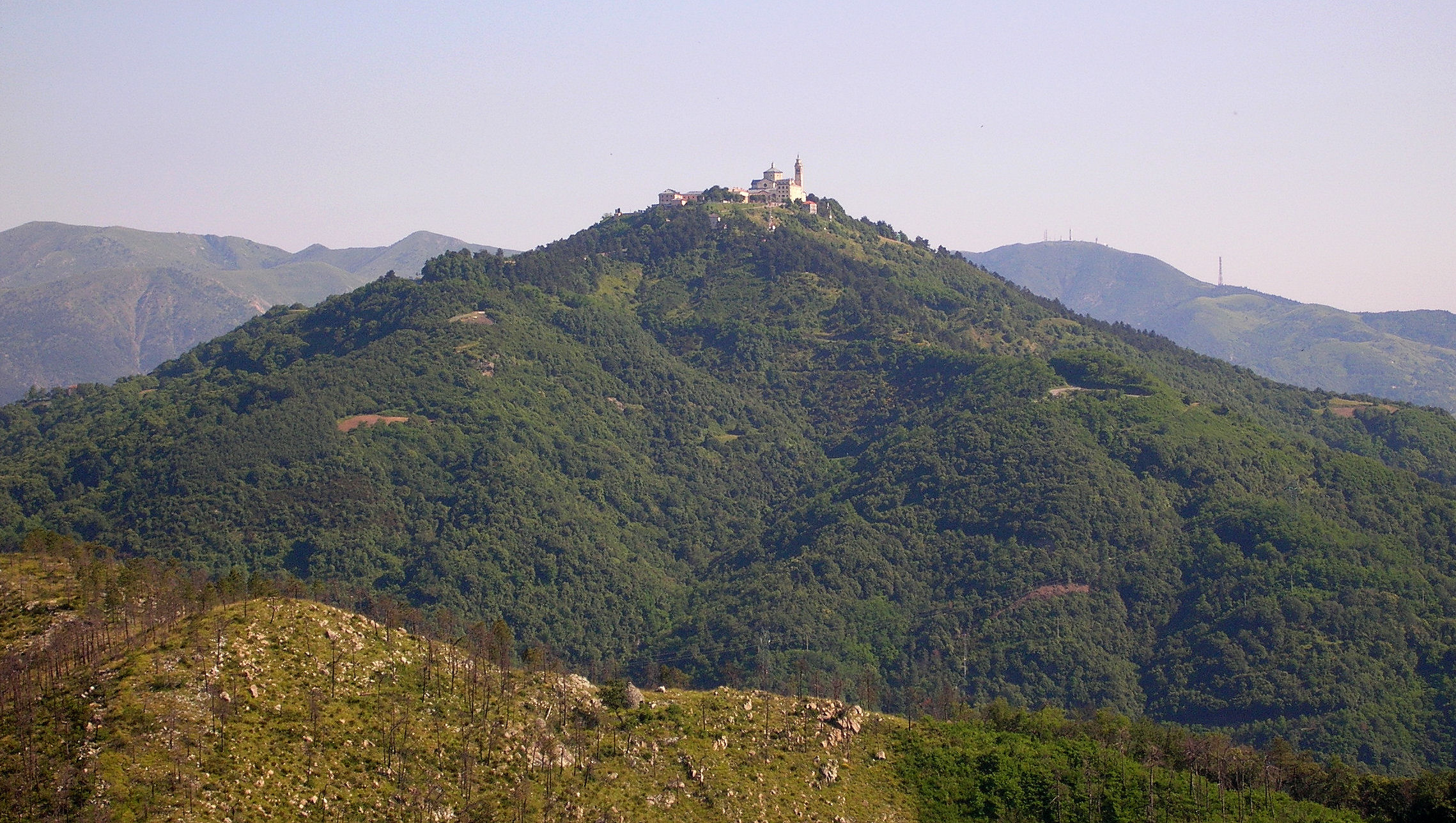 Vue du Mont Figogna avec le sanctuaire mariale au sommet